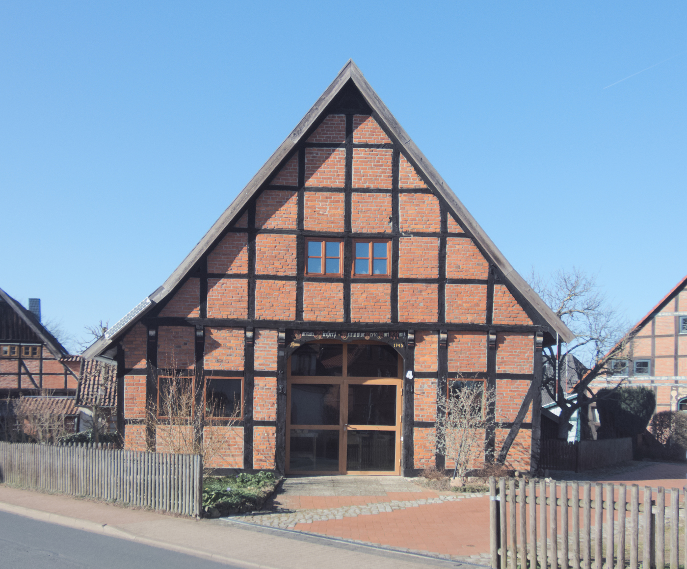 Ältestes Haus und Baudenkmal im Seelzer Stadtteil Letter.